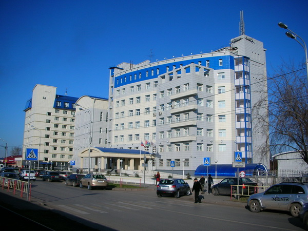 Impostejoj de Tjumeno (Rusio) Все налоговые инспекции Тюмени (ул. Товарное шоссе, 15)